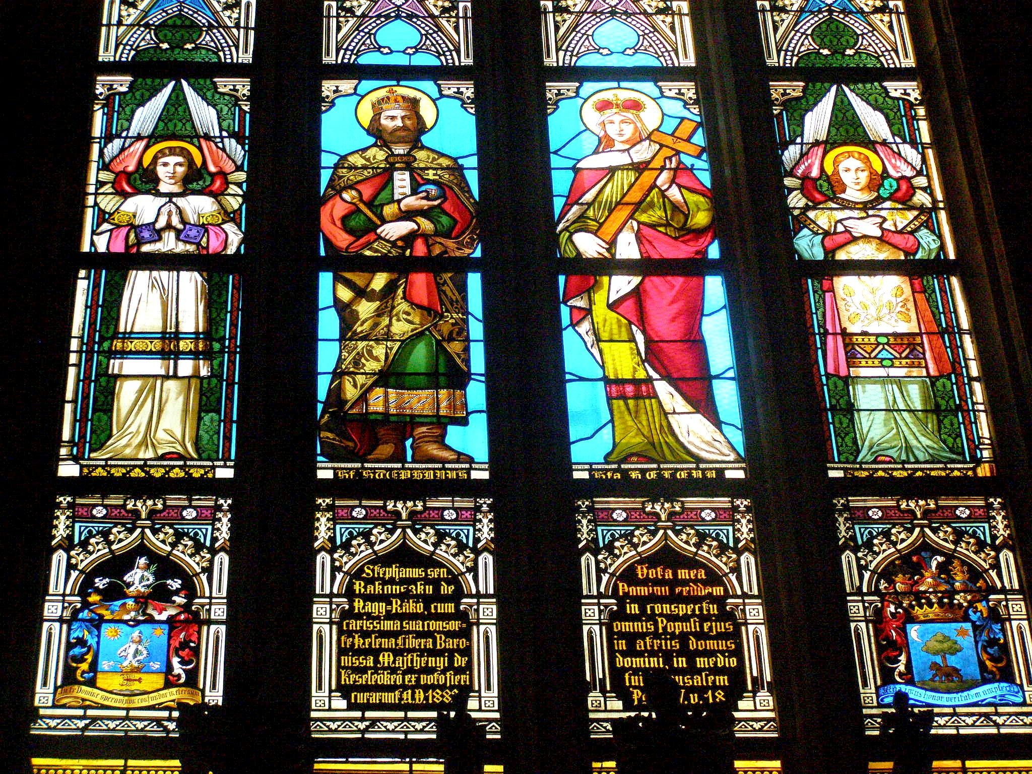 Detail okna Majthényiovcov; medzi dvoma anjelmi stoja sv. Štefan a sv. Helena